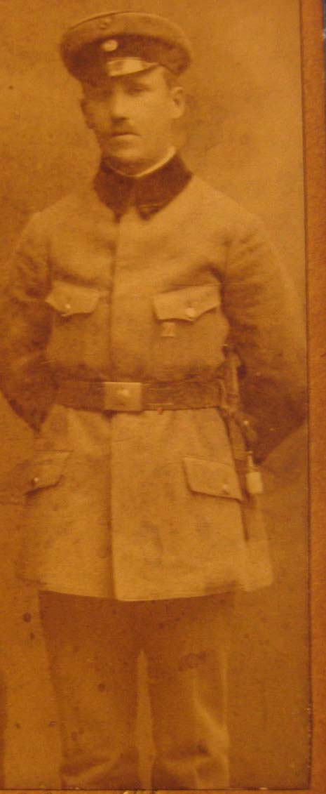 Jääkäri Aarne Tauno Varonen